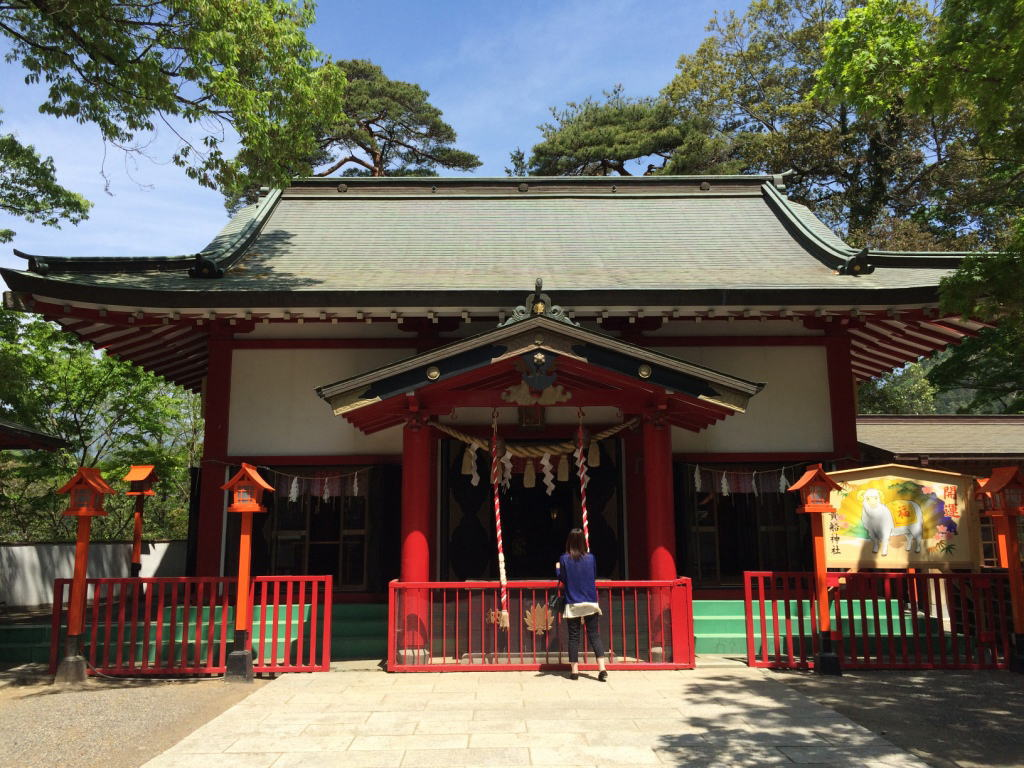 貴船神社（みどり市） 拝殿